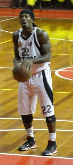 Баскетболист клуба Автодор (Саратов)